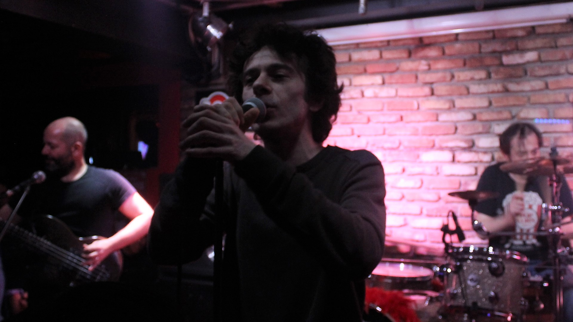 Kurban, Ankara konserinden.